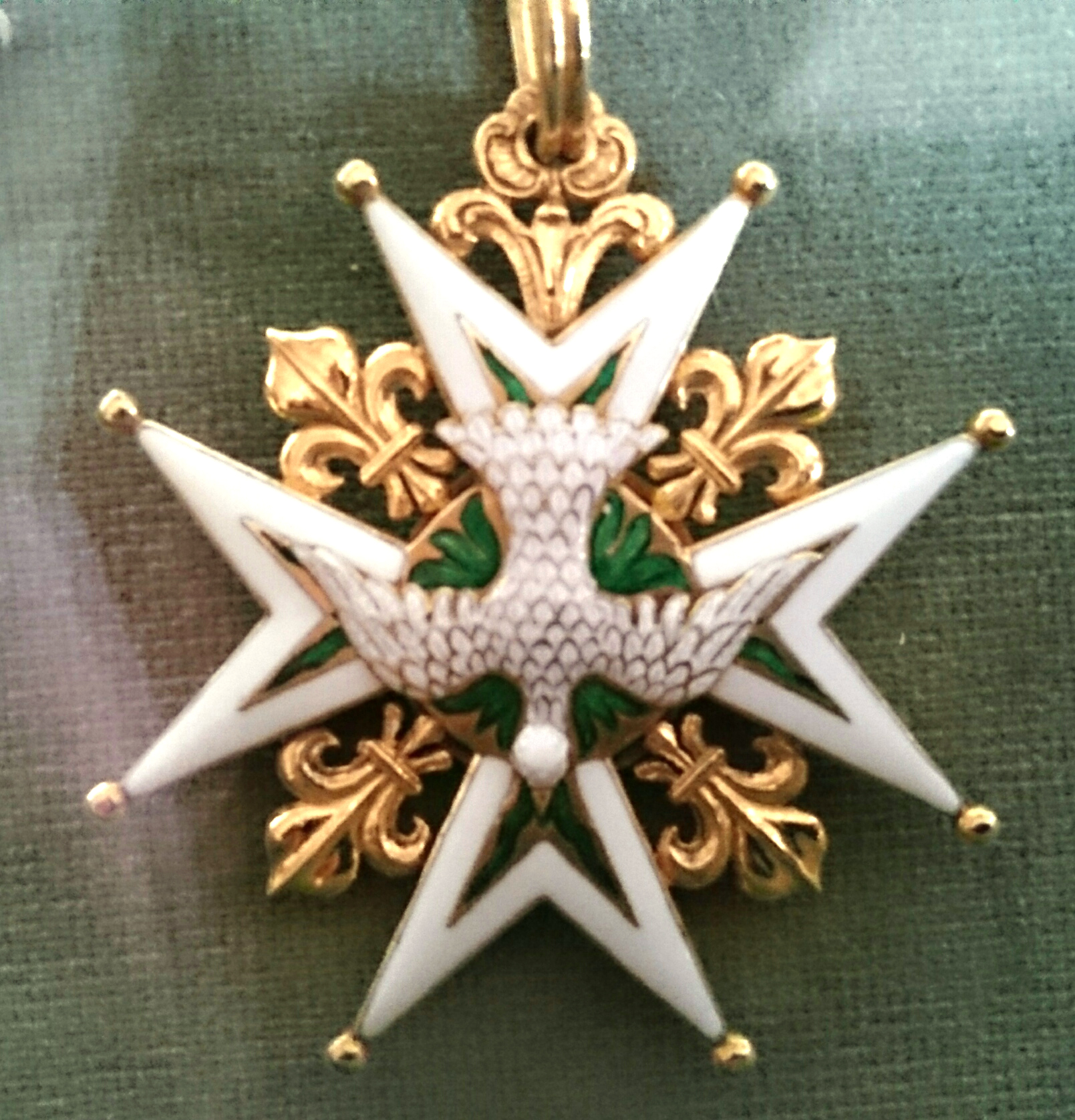 Order of the Holy Spirit